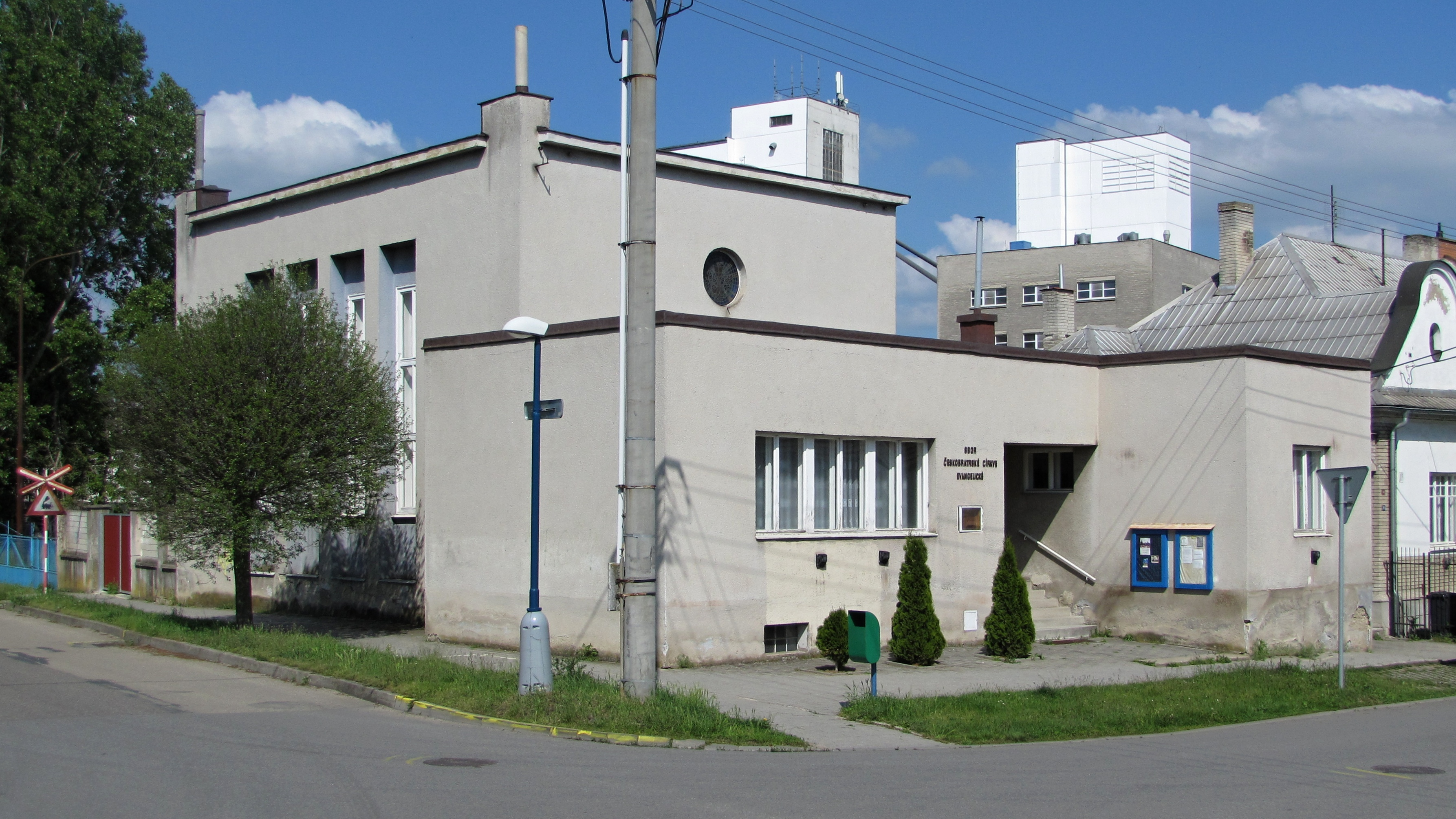 Modlitebna Českobratrské církve evangelické v Kyjově na Dobrovského ulici